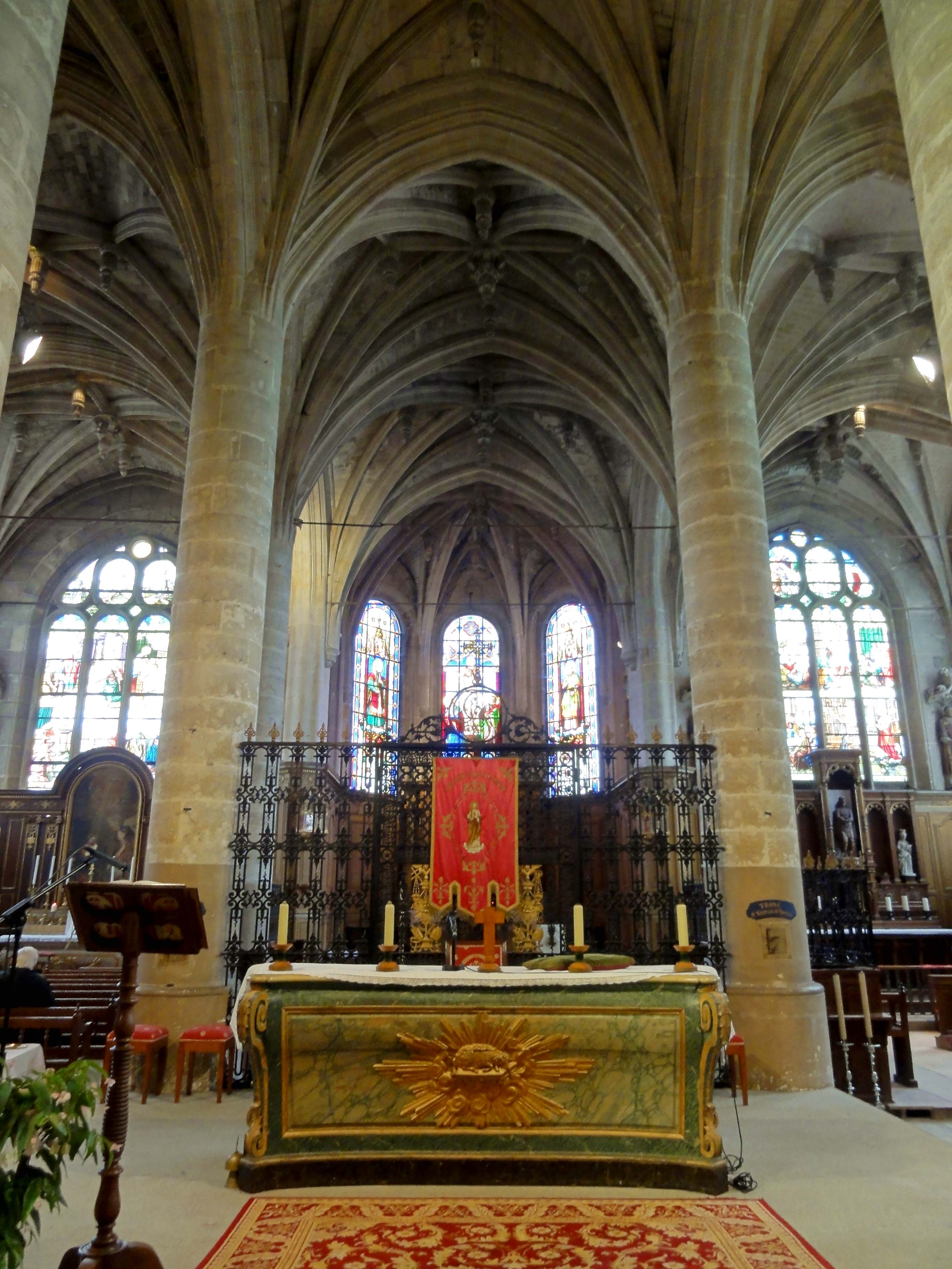 Intérieur de l'église (voir titre).